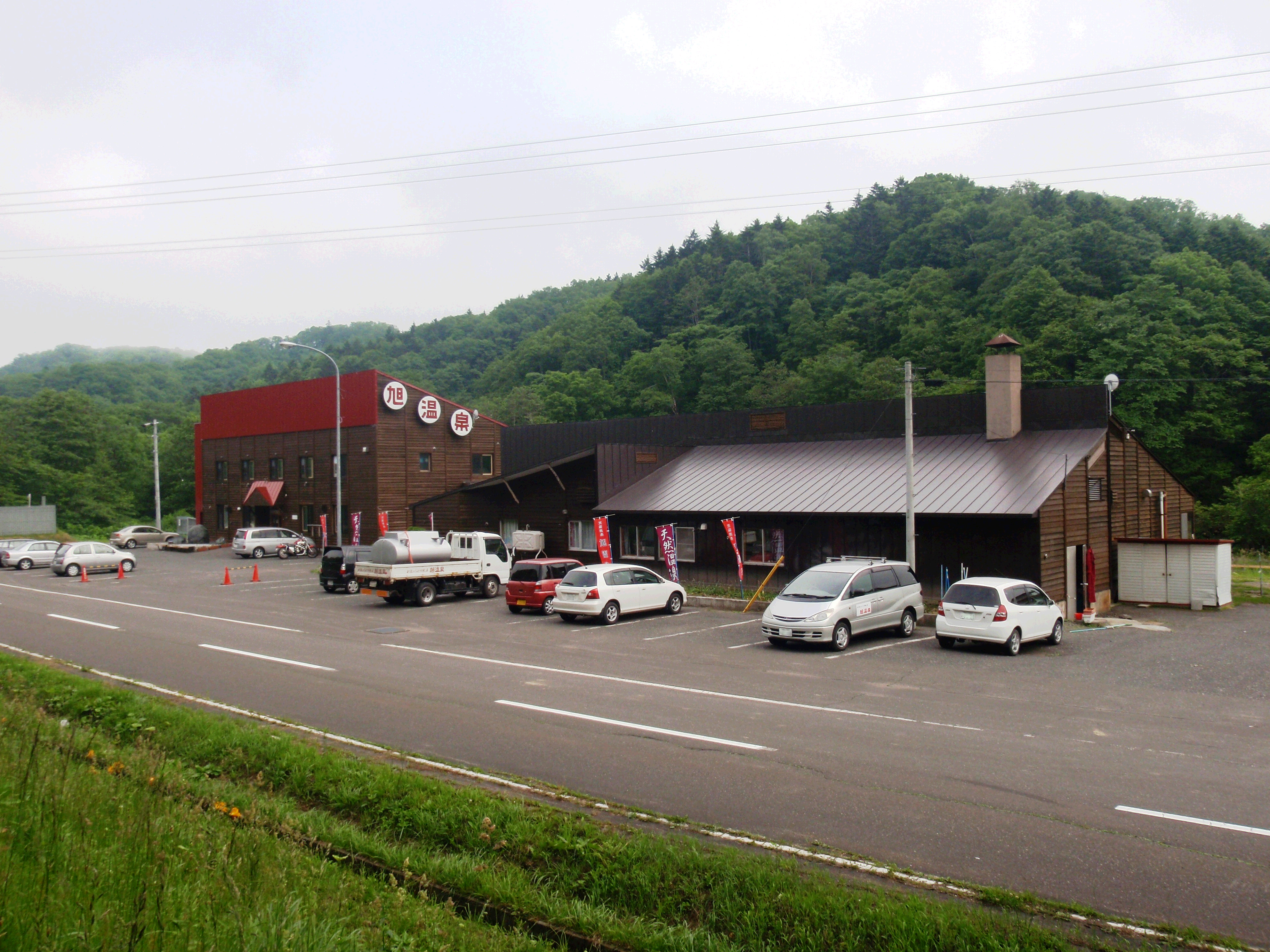 旭温泉外観